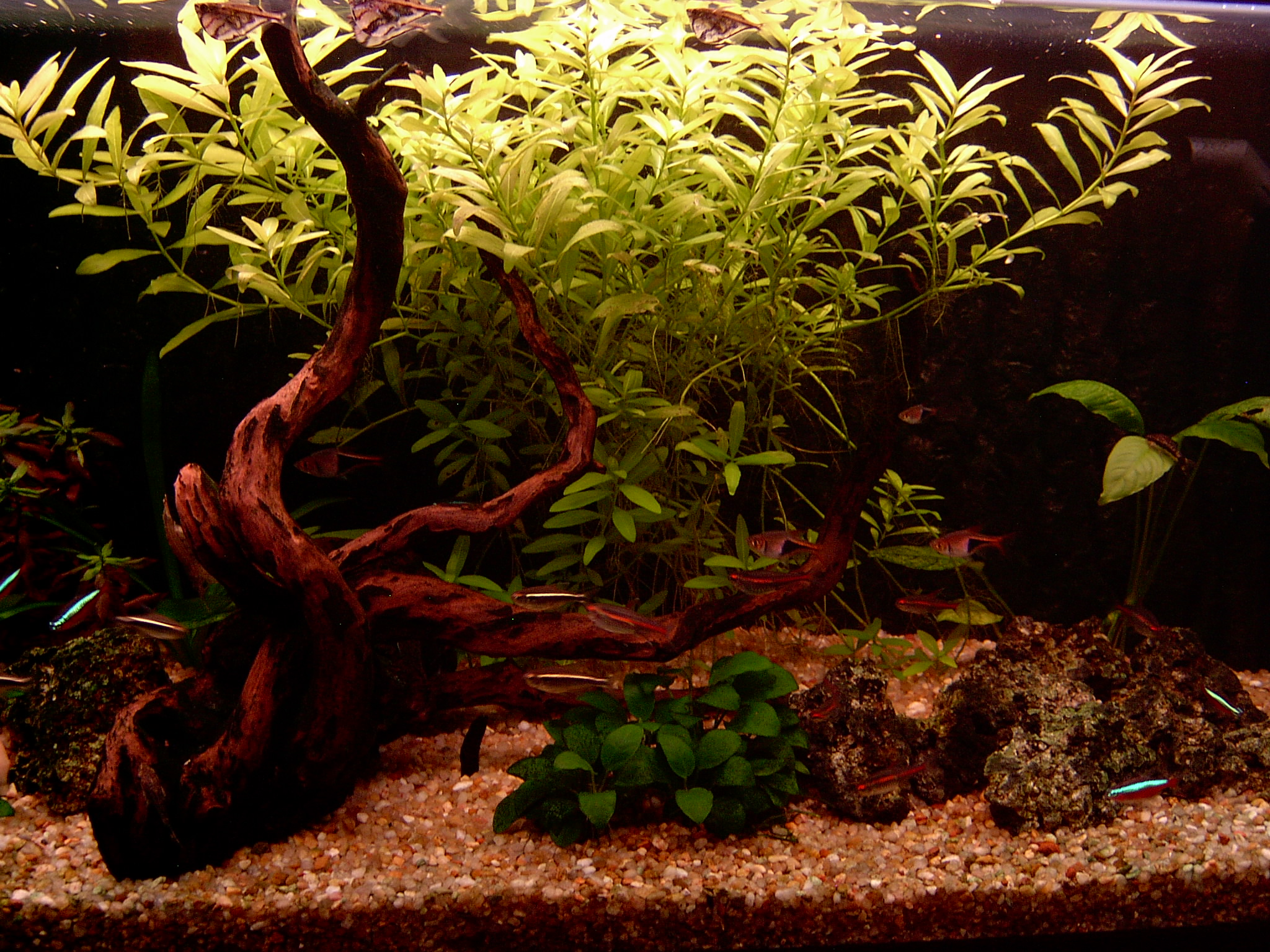 Aquário de água doce - tropical